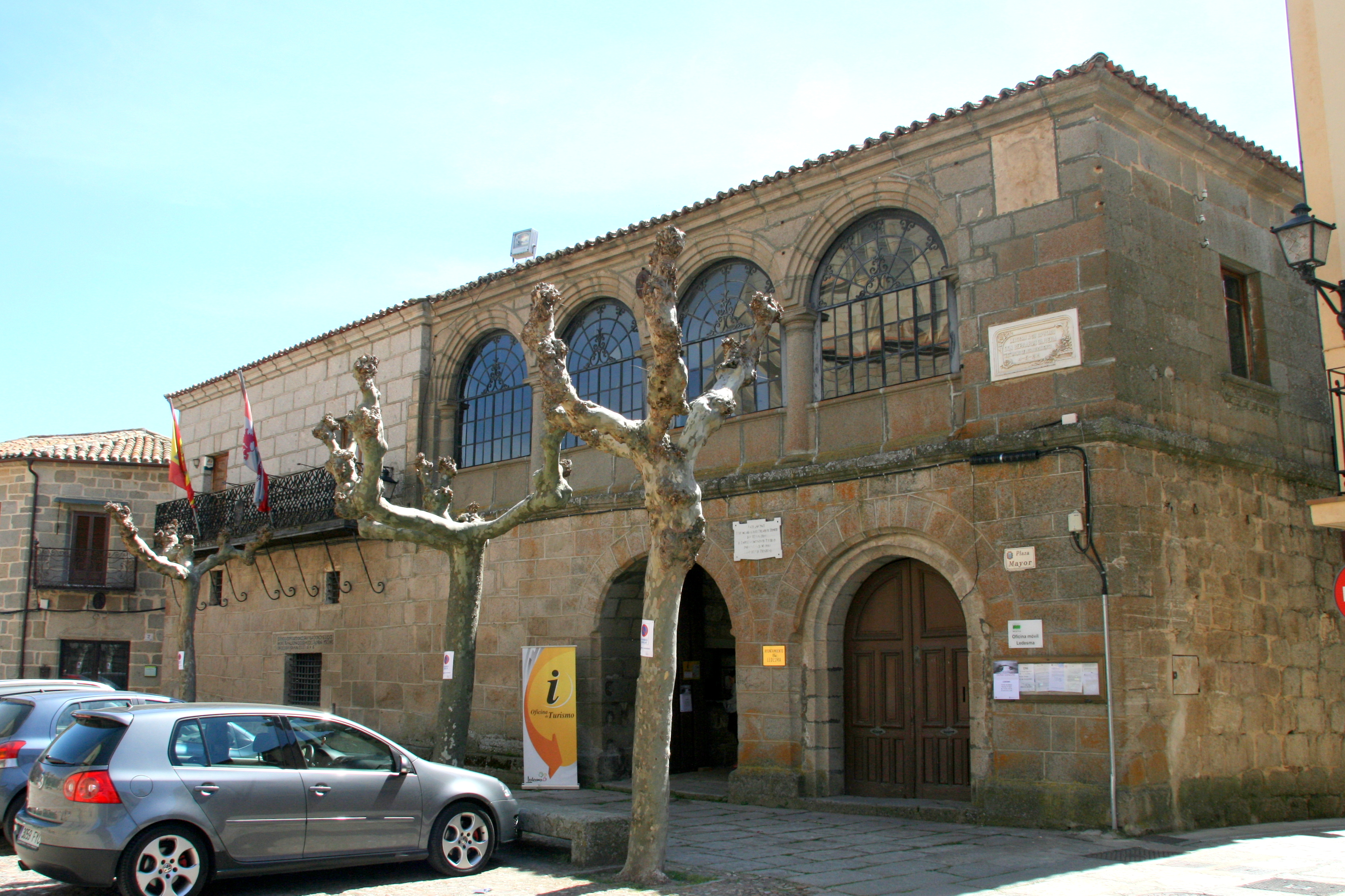 Ayuntamiento de Ledesma, en Salamanca